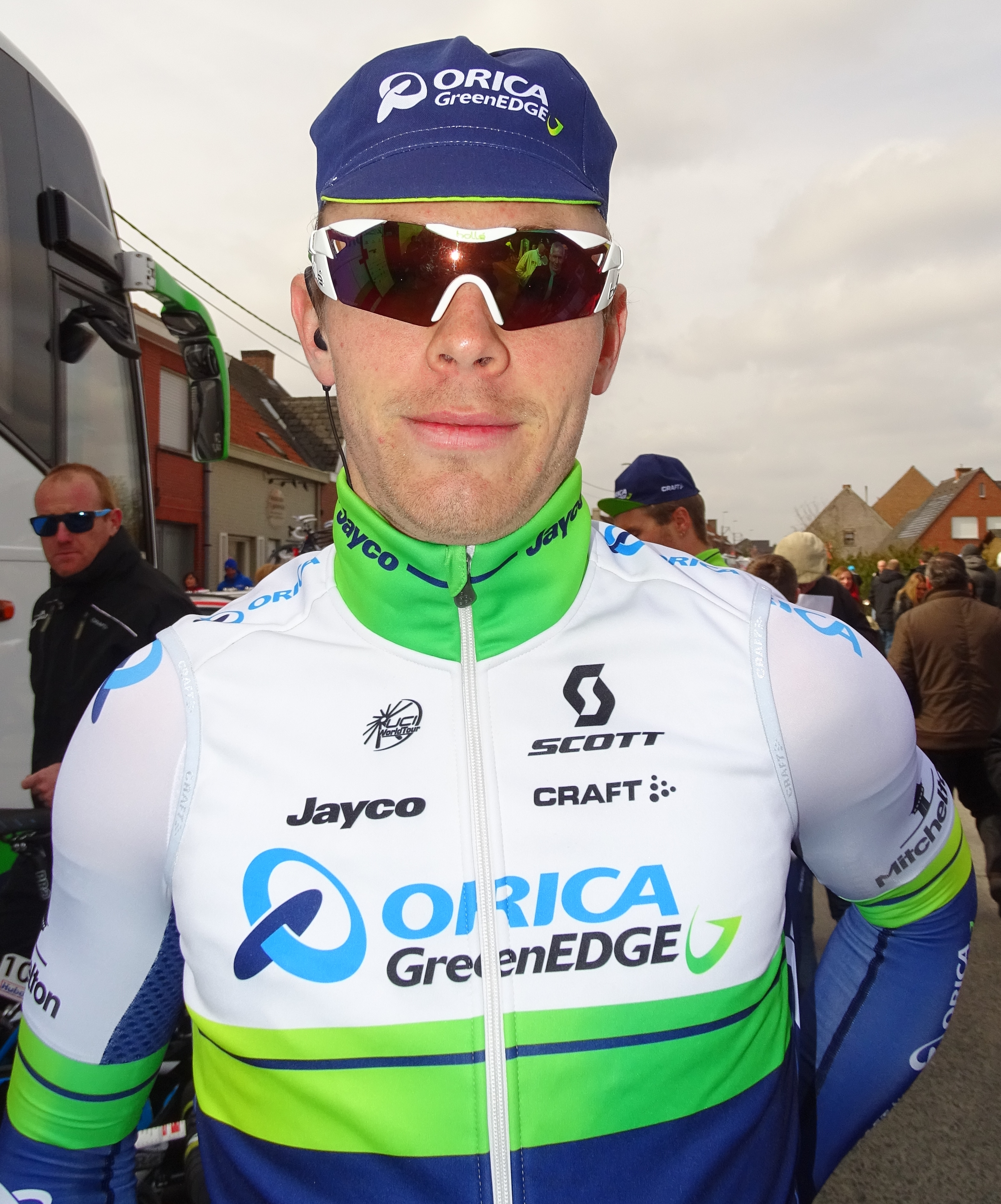 Reportage réalisé le vendredi 27 mars à l'occasion du départ et de l'arrivée du Grand Prix E3 2015 à Harelbeke, Belgique.